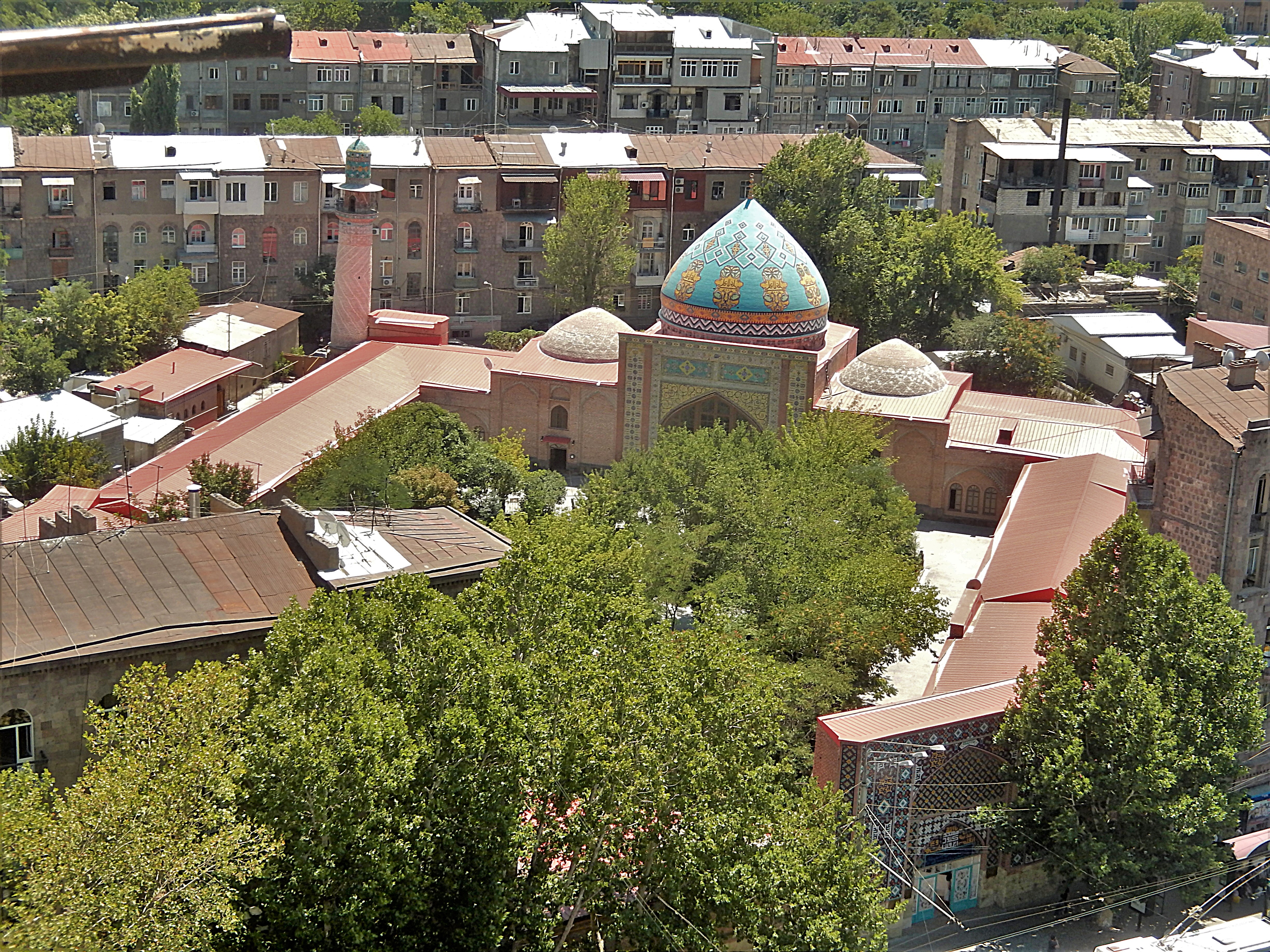 Մզկիթ «Կապույտ» (Գյոյ մզկիթ) 6/150